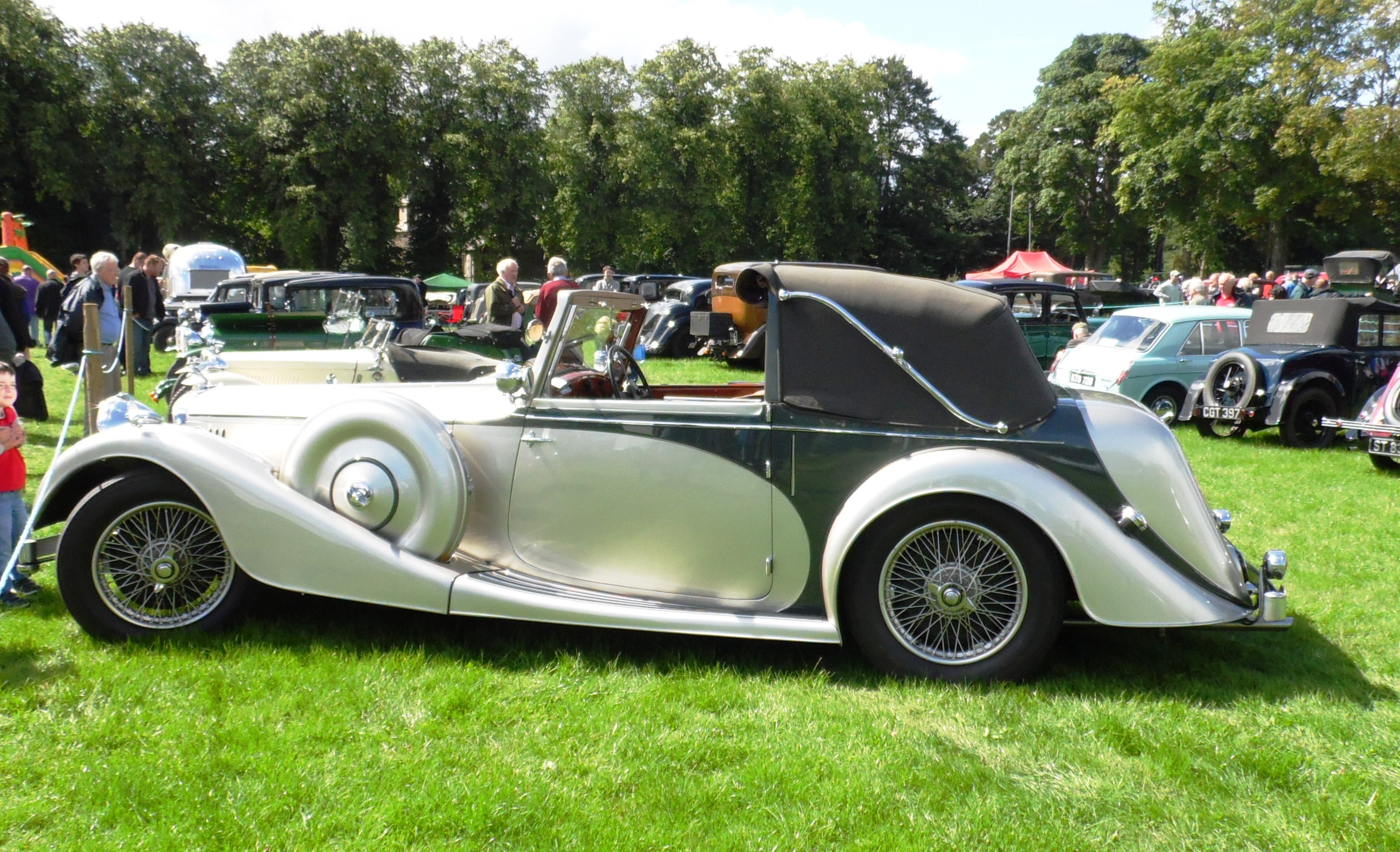 Alvis Speed 25 1938DDU 152